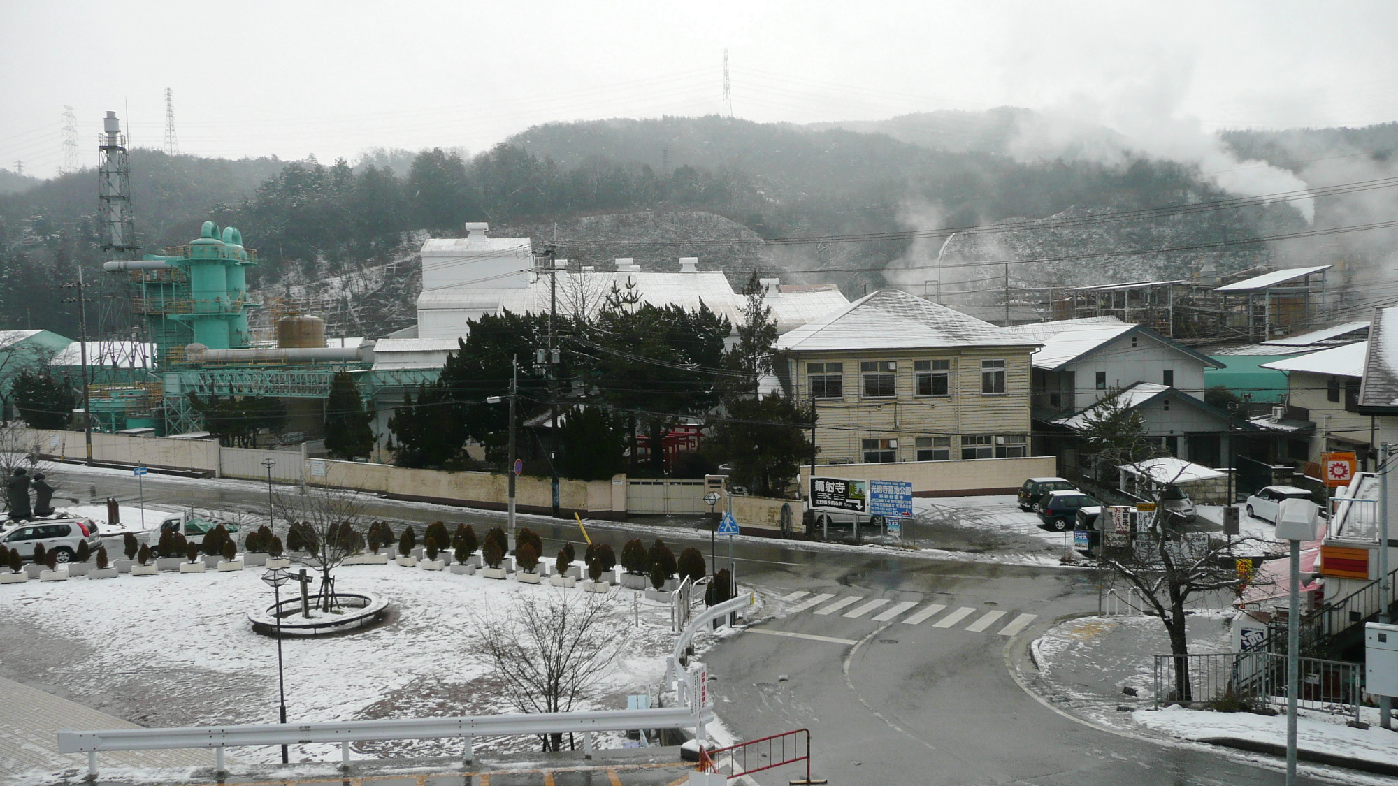 West Japan Railway,Fukuchiyama Line,Dojo Station plaza. / JR福知山線（宝塚線）道場駅・駅前風景